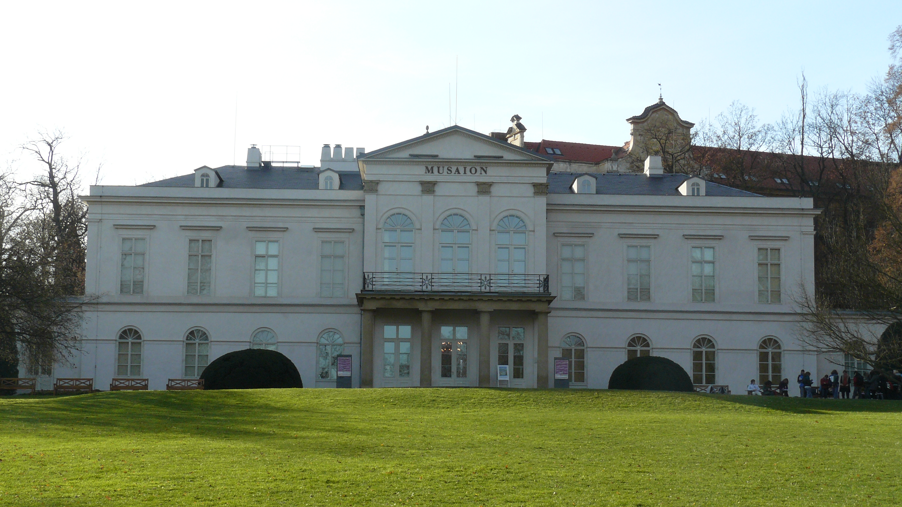 Letohradek Kinskych Praha Smíchov